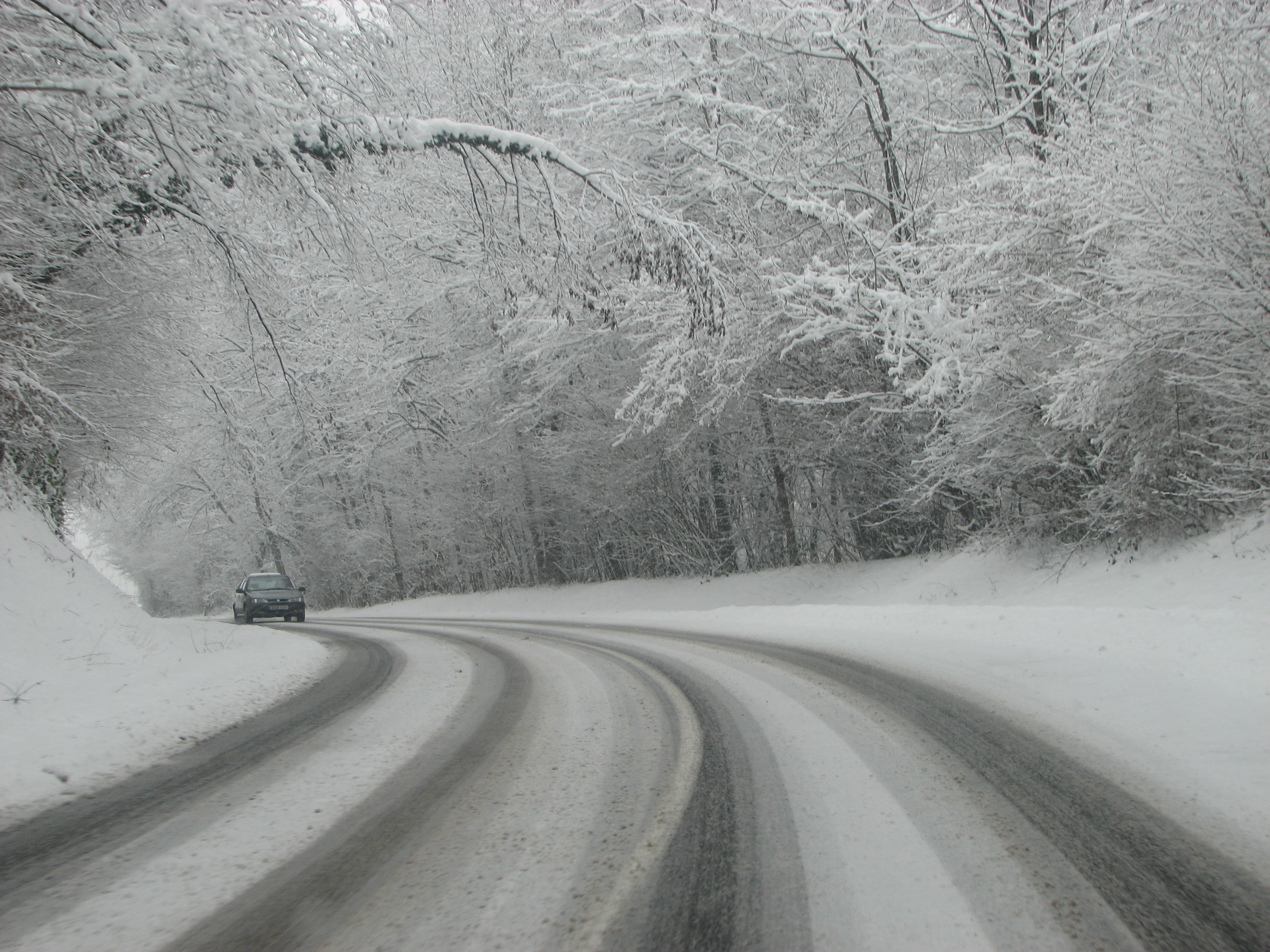 Neige sur la D992, au bord de la forêt de Rothonne (Belley)